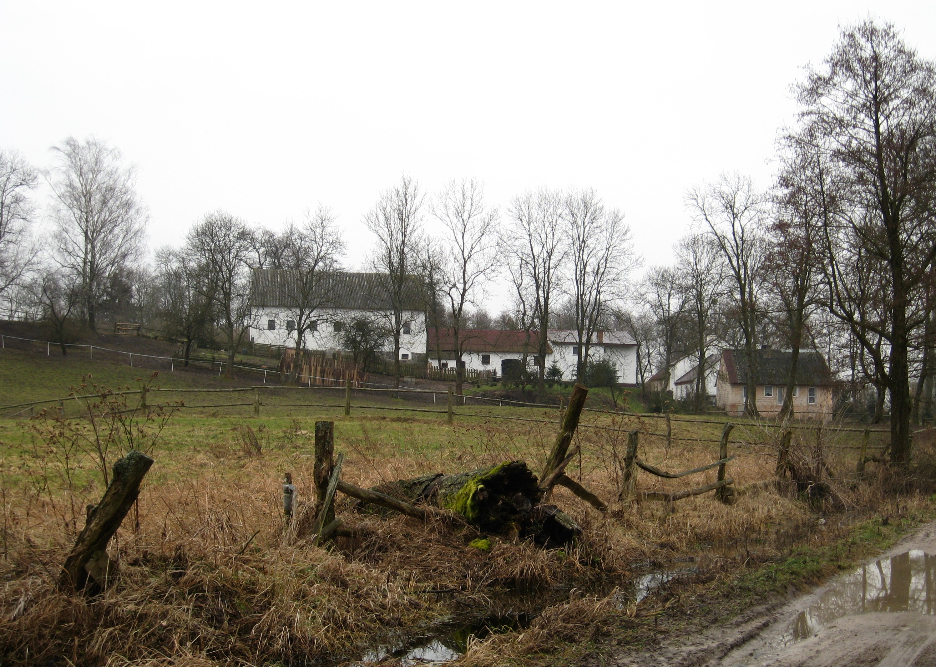 Babieniec - OpenStreetMap(Info)